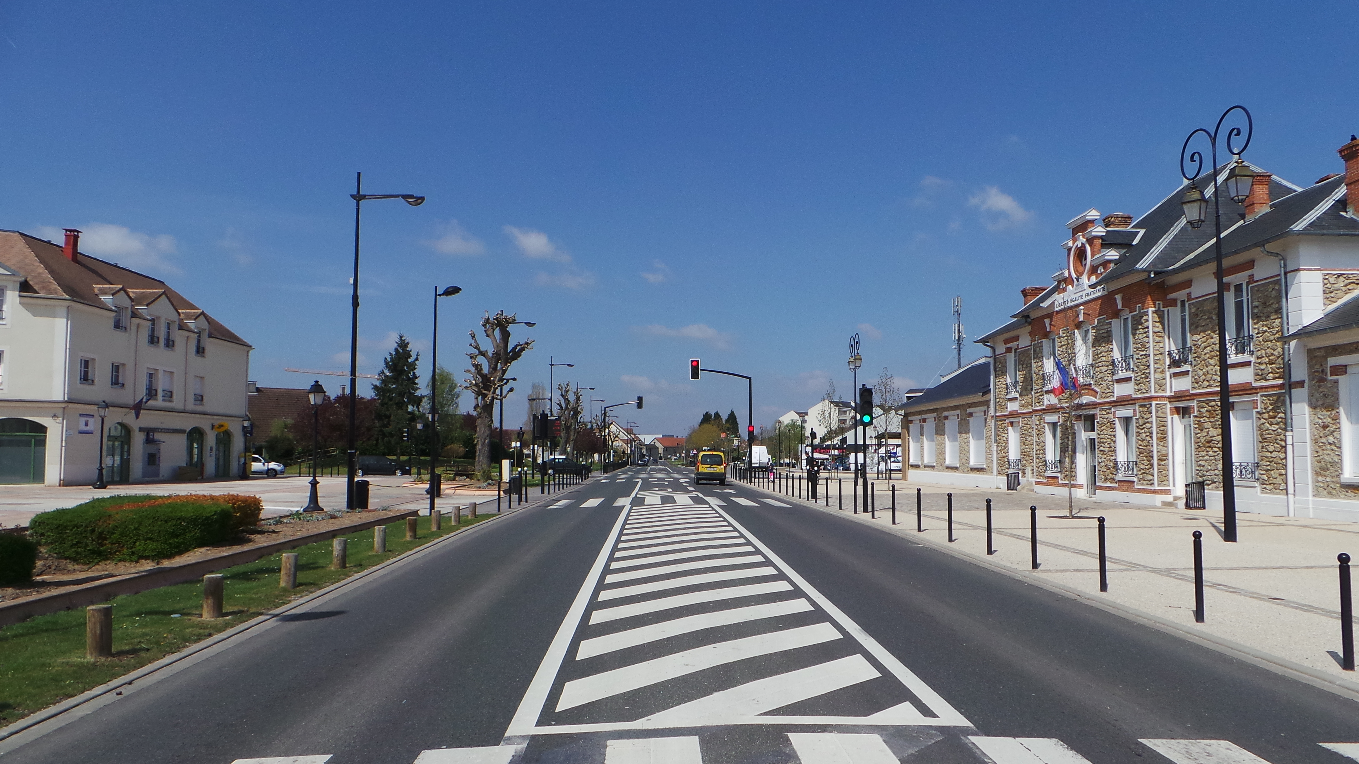 Le Coudray-Montceaux (L'agence postale, à gauche / la N7 au centre / la mairie, à droite), Essonne, France